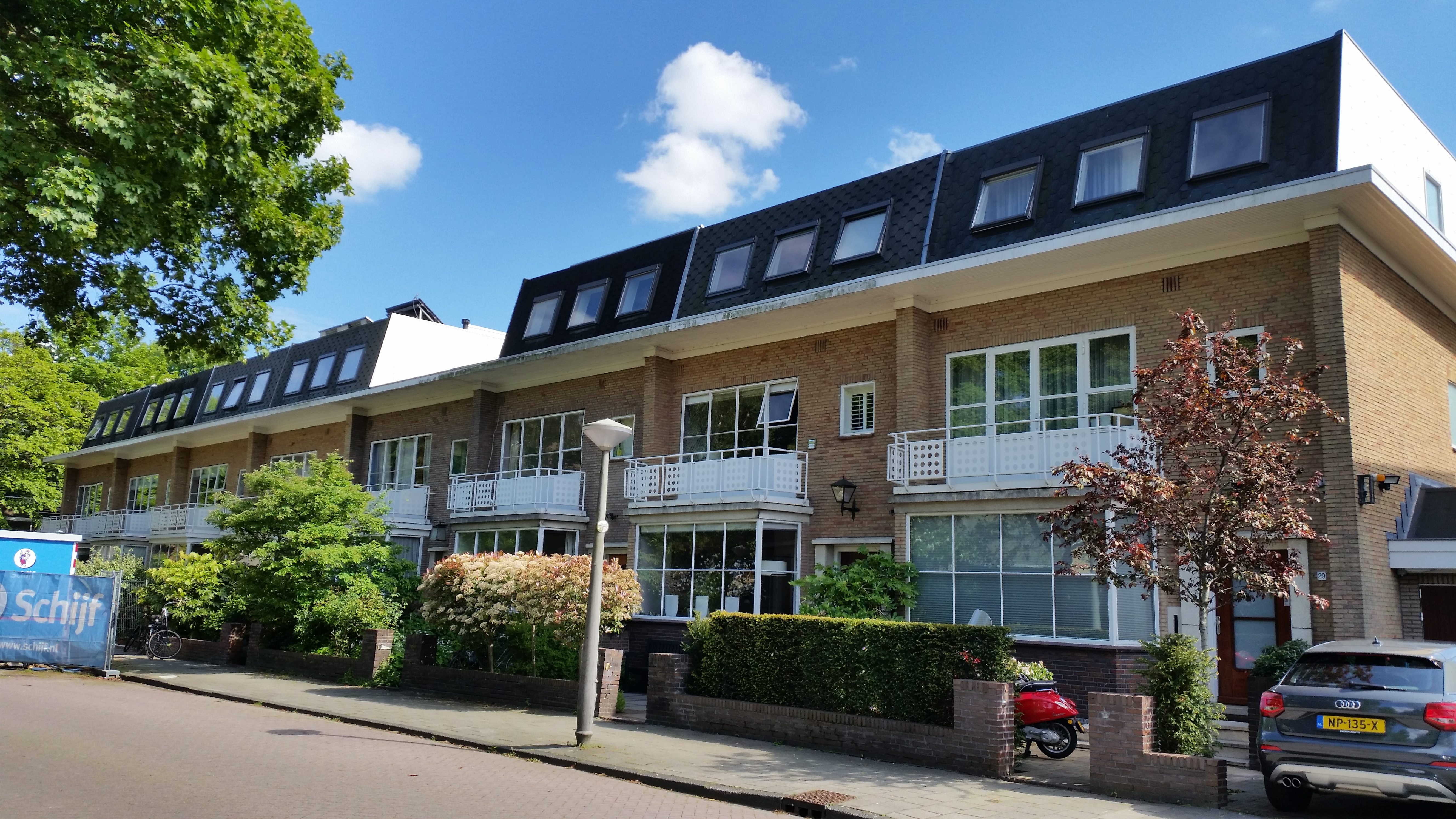 Willem Kesstraat, Amsterdam